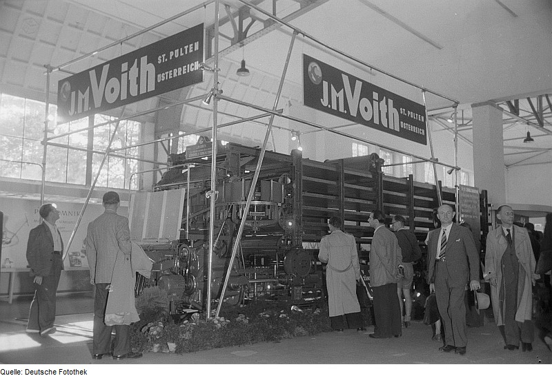 Original image description from the Deutsche Fotothek Zündholztunkautomat der Firma J. M. Voith (St. Pölten) im Rahmen der Kollektiv-Ausstellung der USIA (Verwaltung des sowjetischen Vermögens in Österreich) Wien im Bereich Fahrzeugzubehör, Technische Messe 1953